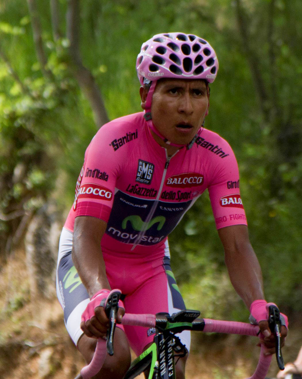 358 quintana